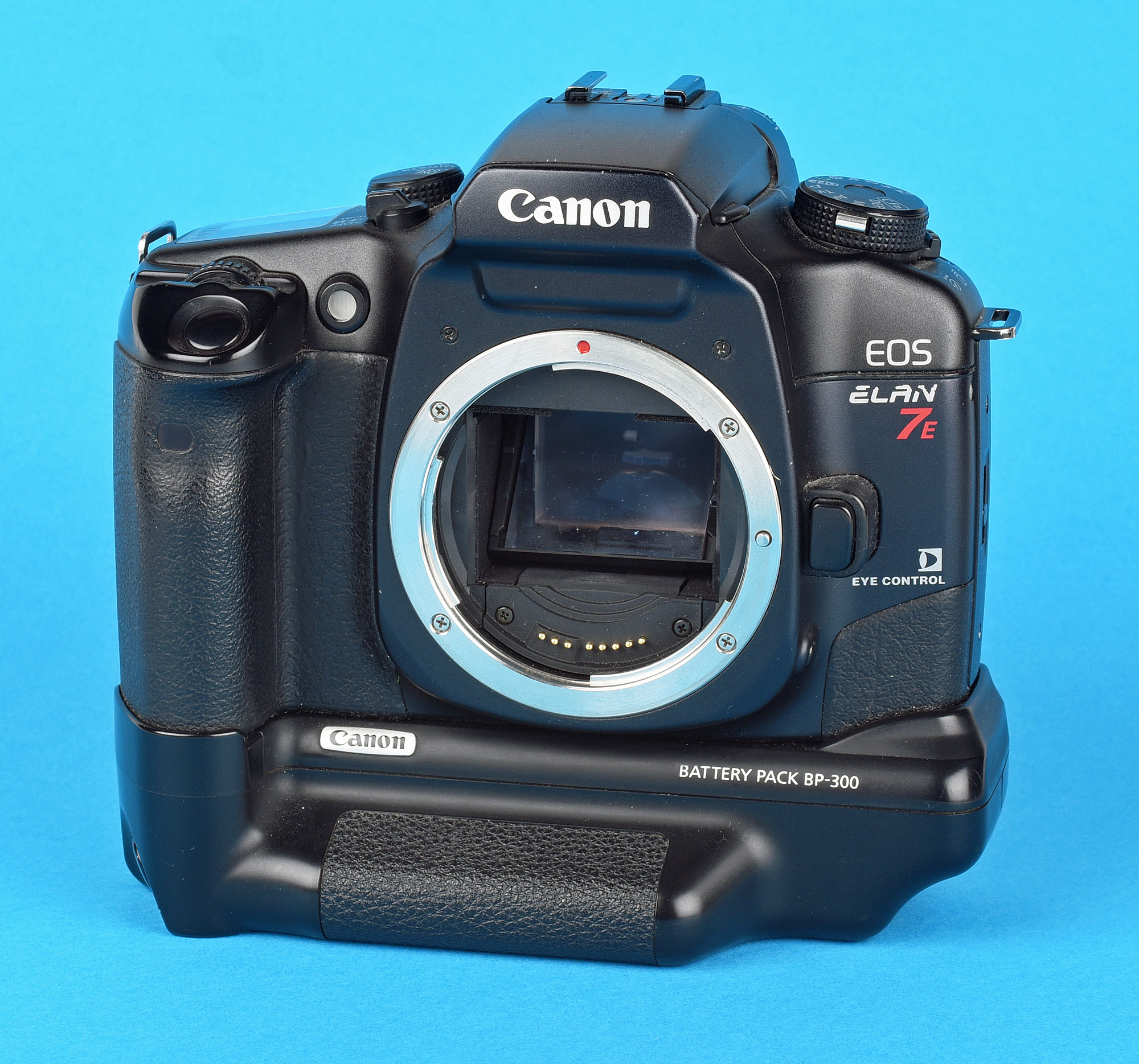 Reflex Canon EOS Elan 7E avec son battery pack BP-300